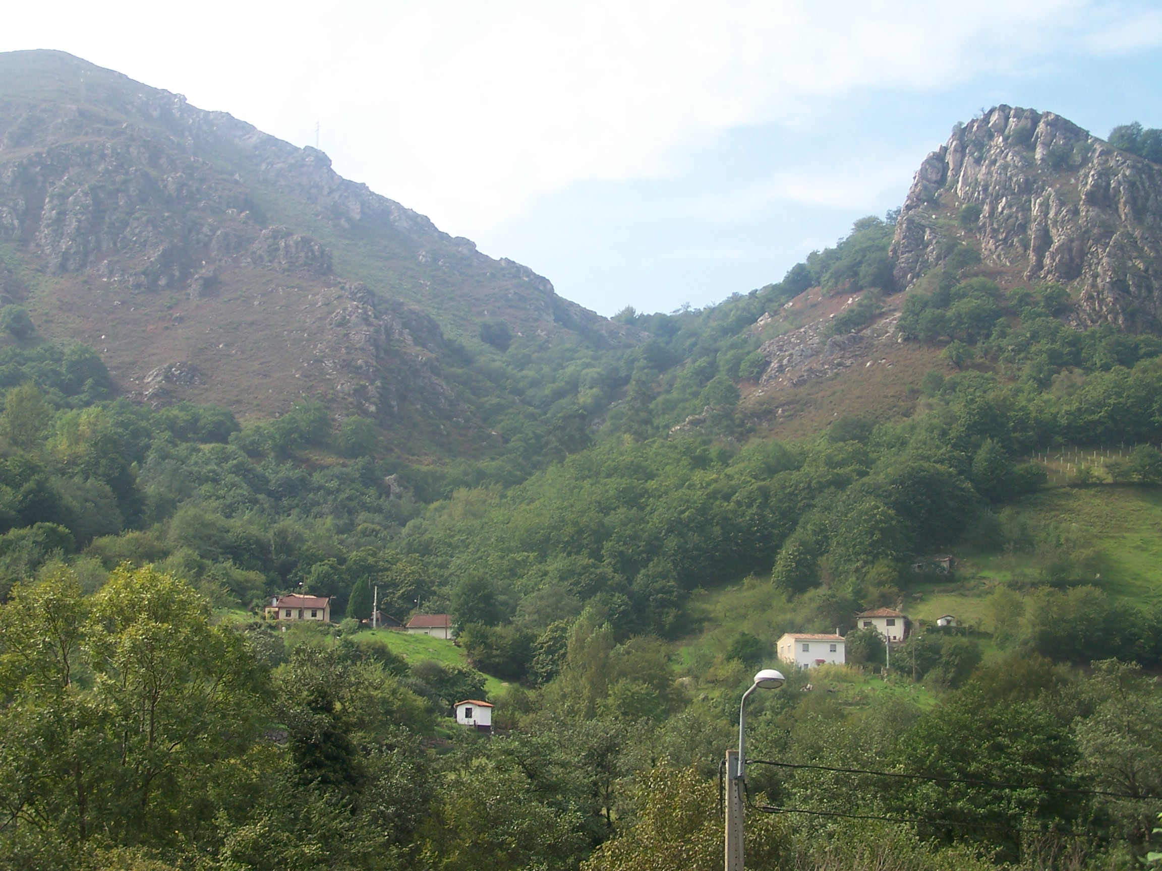 Trubia-Tal